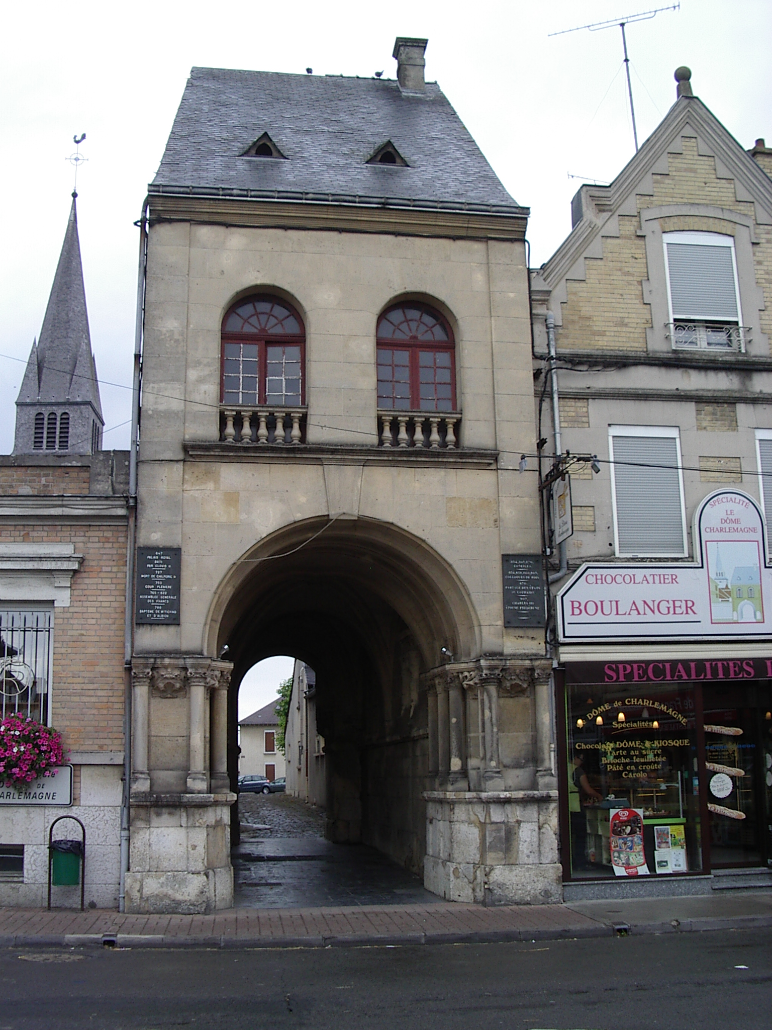 Le palais de Charlemagne est un palais situé à Attigny, en France